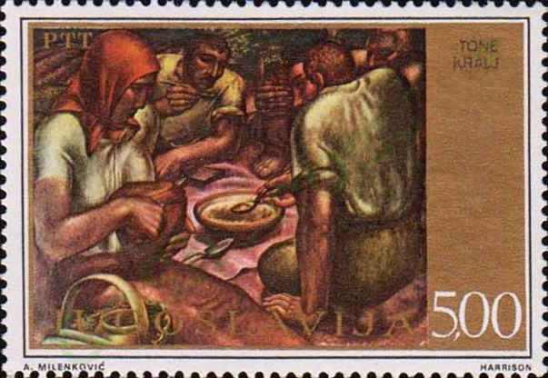 Dinner by Tone Kralj